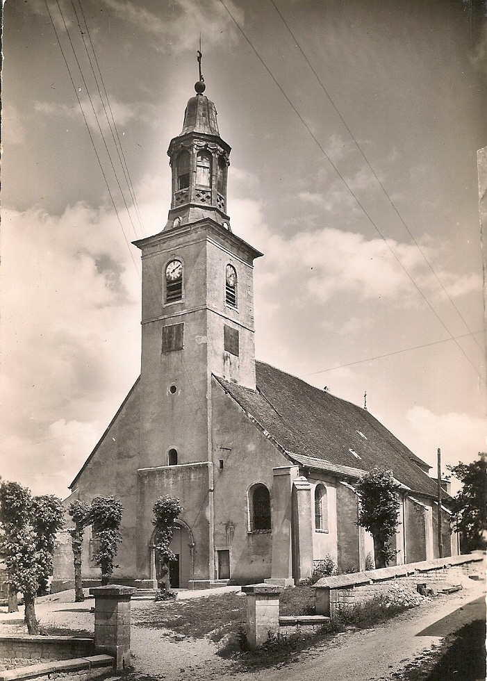 L'église de Champvans (Jura) et son ancien clocher de type « lanterne ».